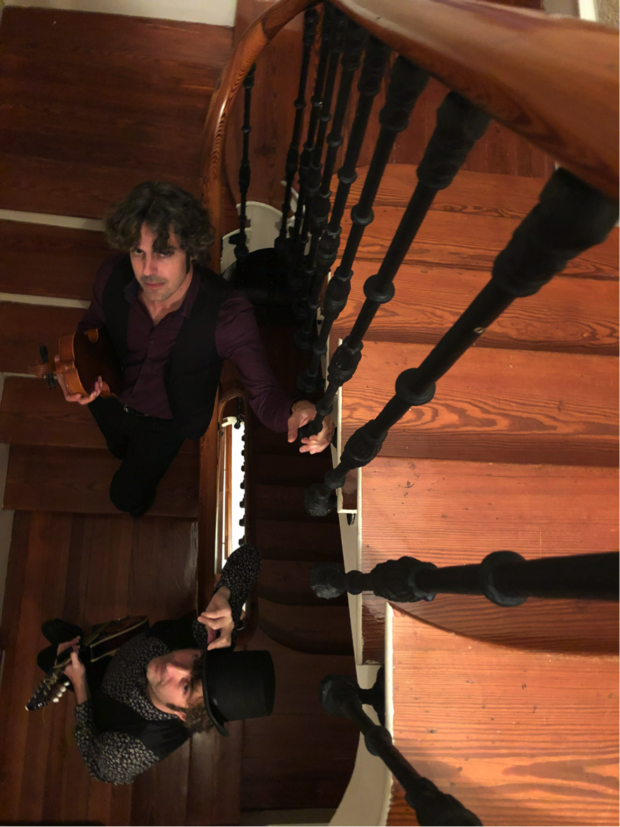 Bosco Hill e Ruben Xuarez, Vigo, 2018